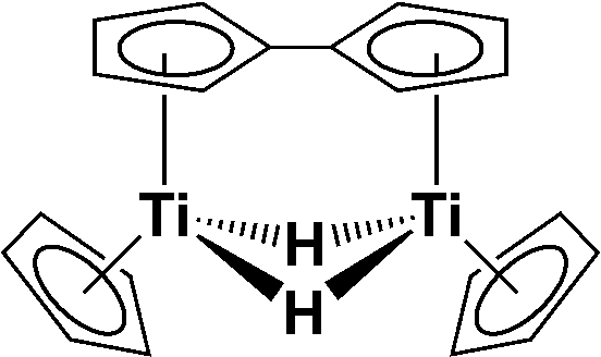 zweikerniges Titanocen